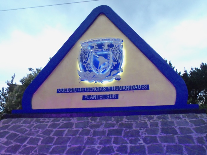 Fuente de la entrada al plantel